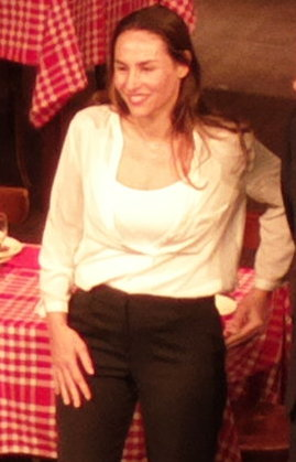 "L'appel de Londres" de Philippe Lellouche Avec Vanessa Demouy, Philippe Lellouche, David Brécourt et Christian Vadim au Théâtre du Gymnase